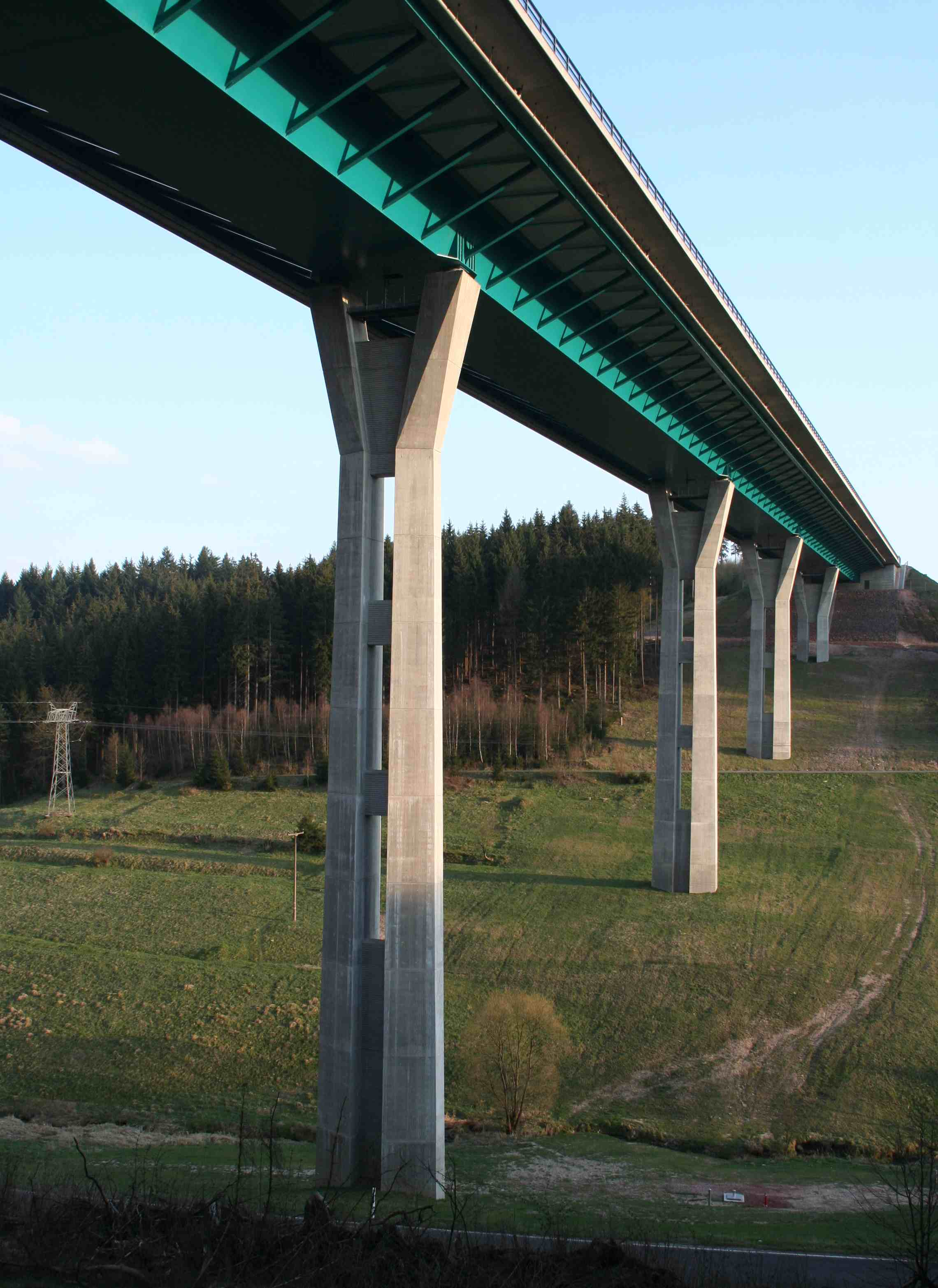 Talbrücke Dambachtal, Bundesautobahn A73bei Breitenbach, Gemeinde St. Kilian, Landkreis Hildburghausen in Thüringen